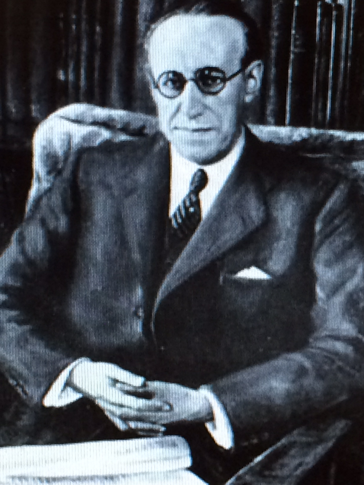 Compositor, violista, director i professor espanyol.